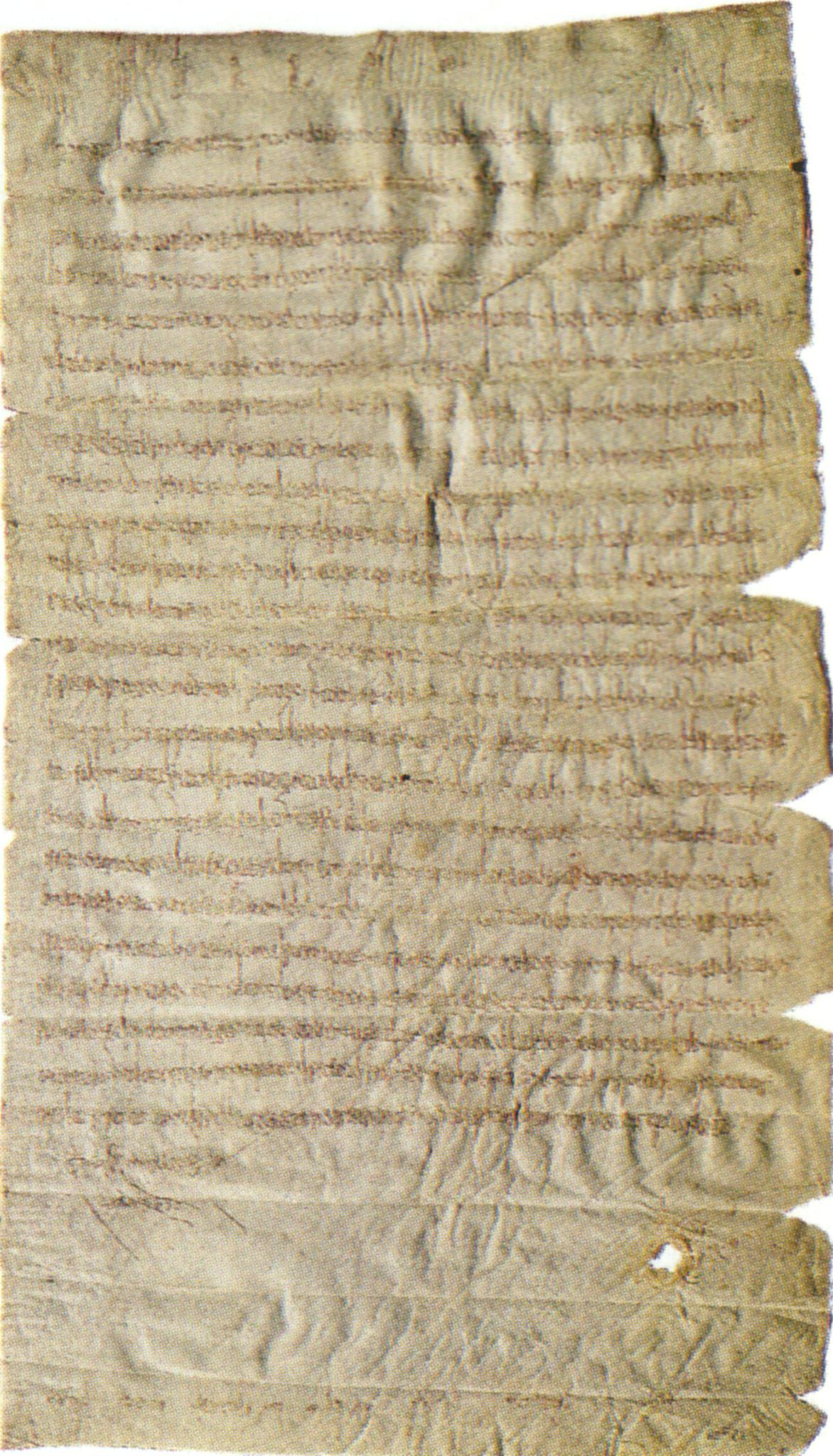 Jugement rendu par Childebert III attribuant à l'abbaye de Saint-Denis la perception de tous les droits sur les marchands participant à la foire de la Saint-Denis, à Saint-Denis même ou dans les environs de Paris, et l’exemptant de toute retenue de la part du fisc.